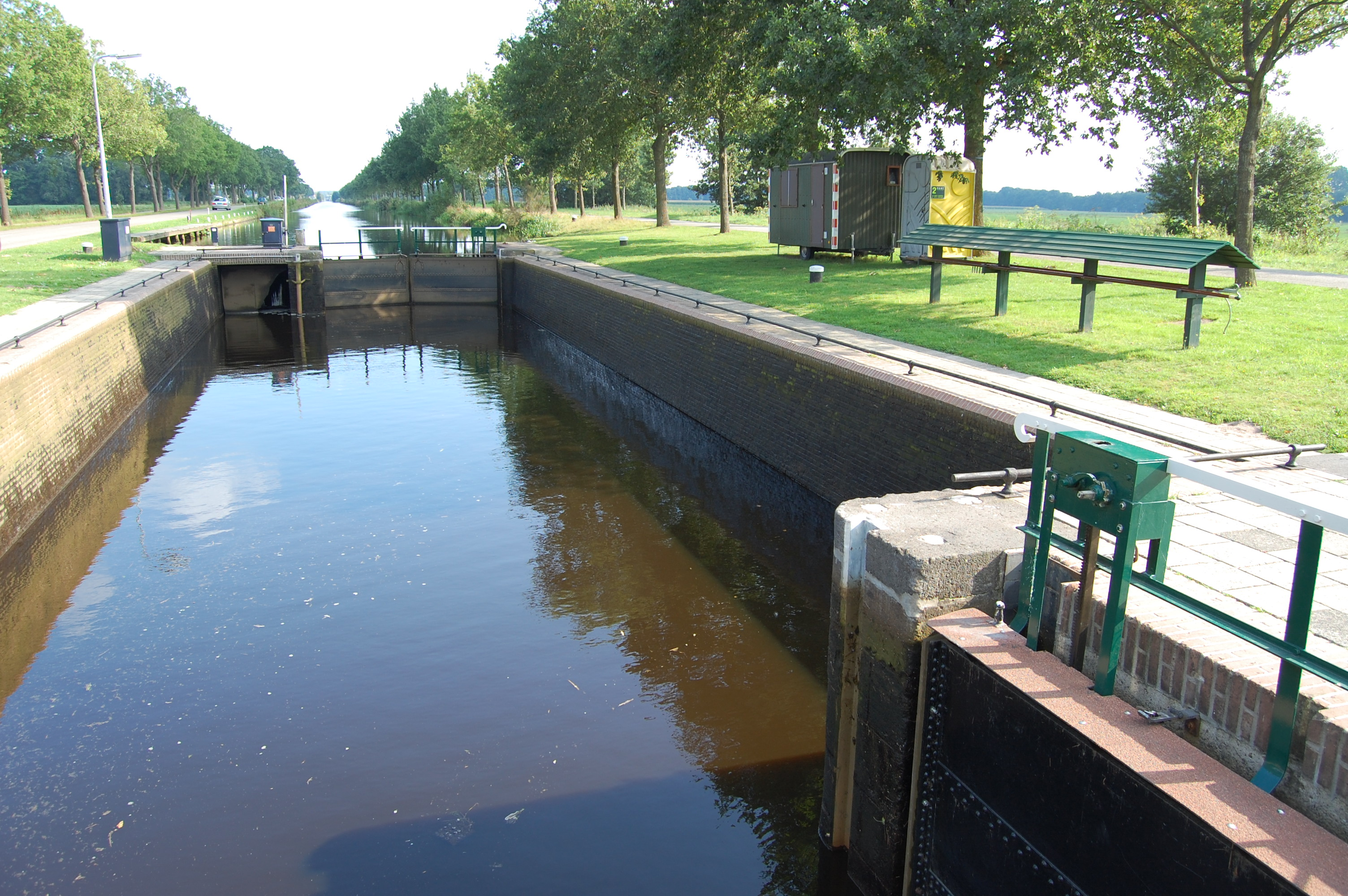 Het Fochtelo'r Verlaat in de Opsterlandse-Compagnonsvaart.